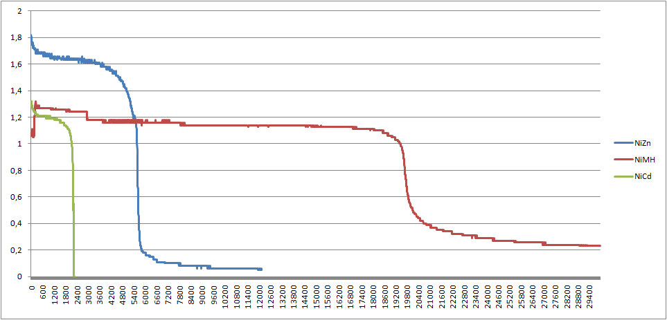 Der Graph zeigt eine Entladungskurve. Auf der x-Achse befindet sich die Zeit in Sekunden und auf der y-Achse befindet sich die Spannung in Volt. Die blaue Linie stellt dabei die Entladungskurve des Nickel-Zink-Akkumulators dar, die rote Linie die Entladungskurve des Nickel-Metallhydrid-Akkumulators und die grüne Linie die Entladungskurve des Nickel-Cadmium-Akkumulators.